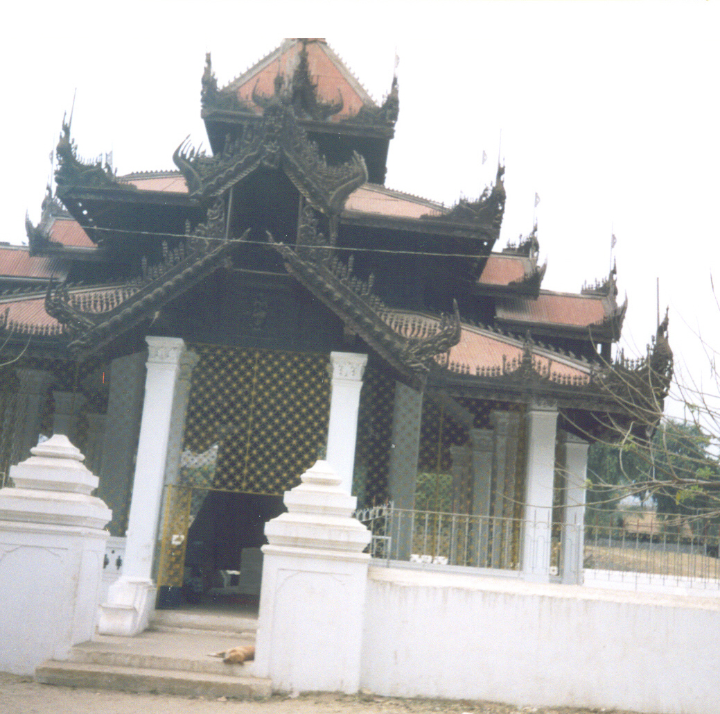 Храм в МандалаеБуддийский храм в Мандалае, Бирма